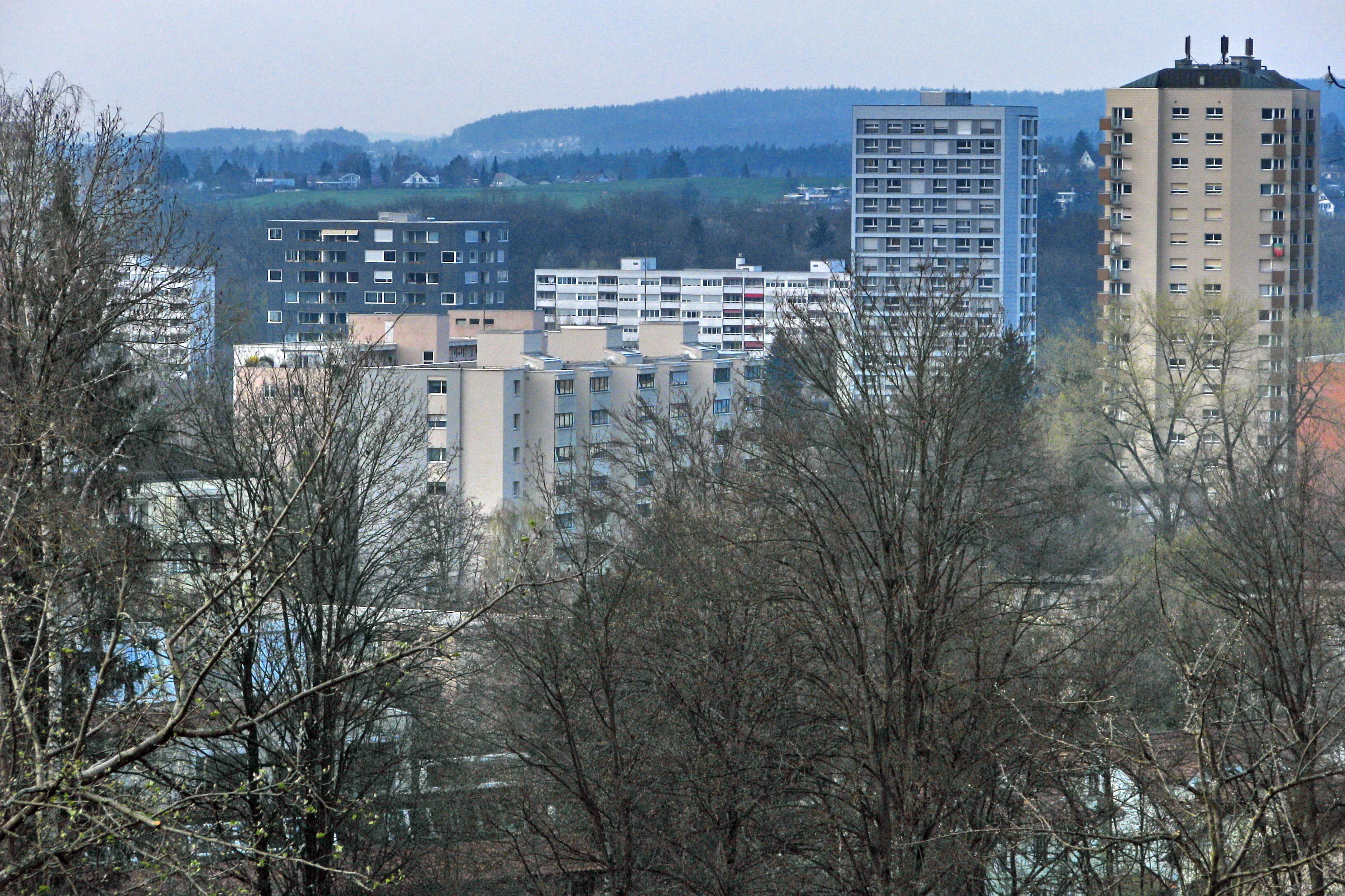 Zürich-Hirzenbach nearby Sagentobel on Adlisberg (Switzerland)